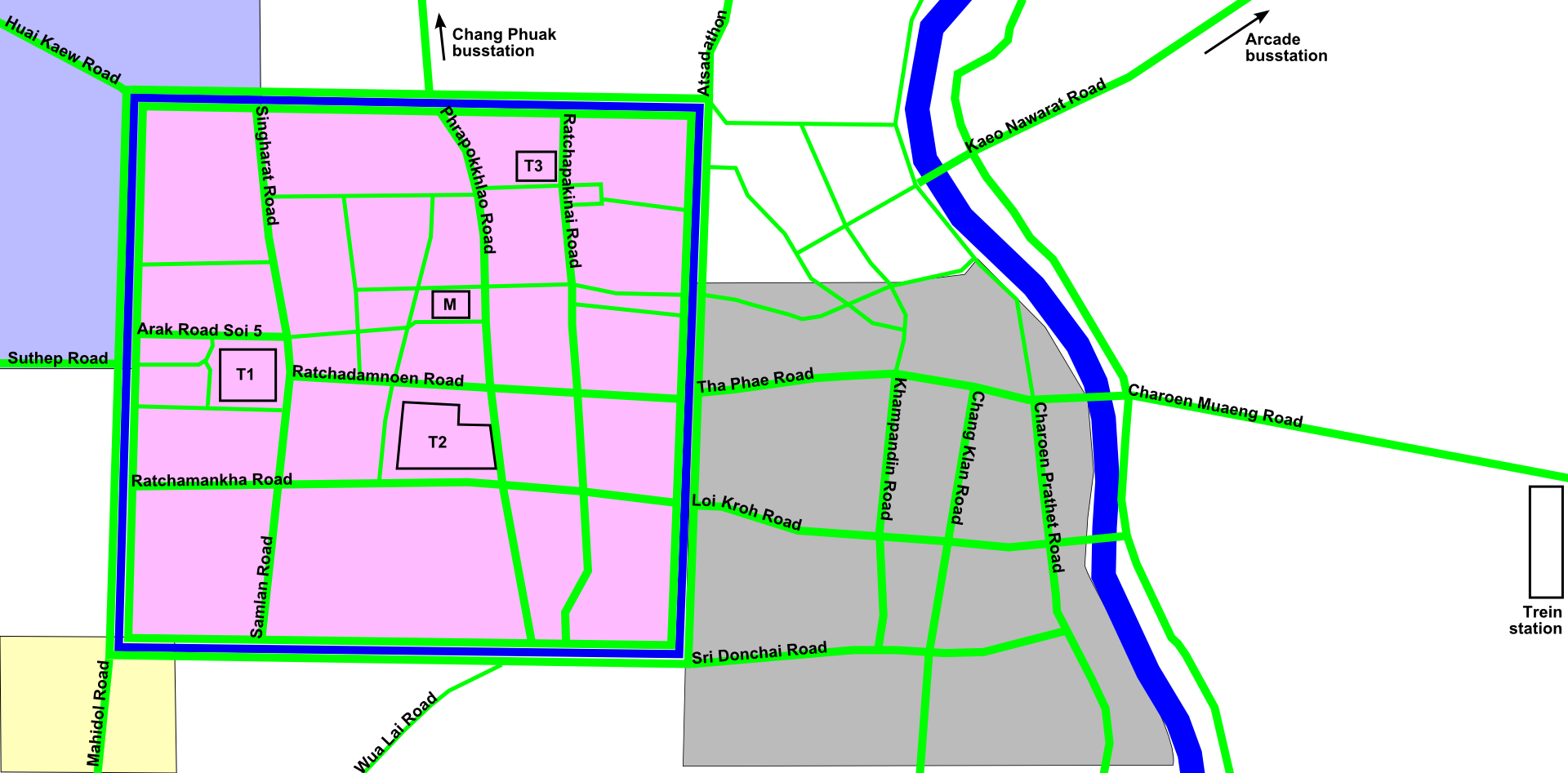 Kaart van Chiang Mai centrum. T1=Wat Phra Sing, T2=Wat Chedi Luang, T3=Wat Chiang Man, M=Monument 3 Koningen en Museum